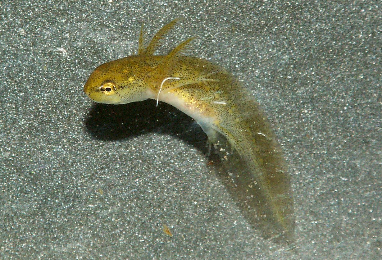 Larva of smooth newt Triturus vulgaris aka Lissotriton vulgaris